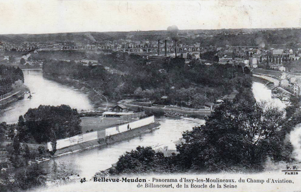 Carte postale ancienne de Bellevue-Meudon, Panorama d'Issy-les-Moulineaux, du Champ d'Aviation de Billancourt, de la Boucle de la Seine